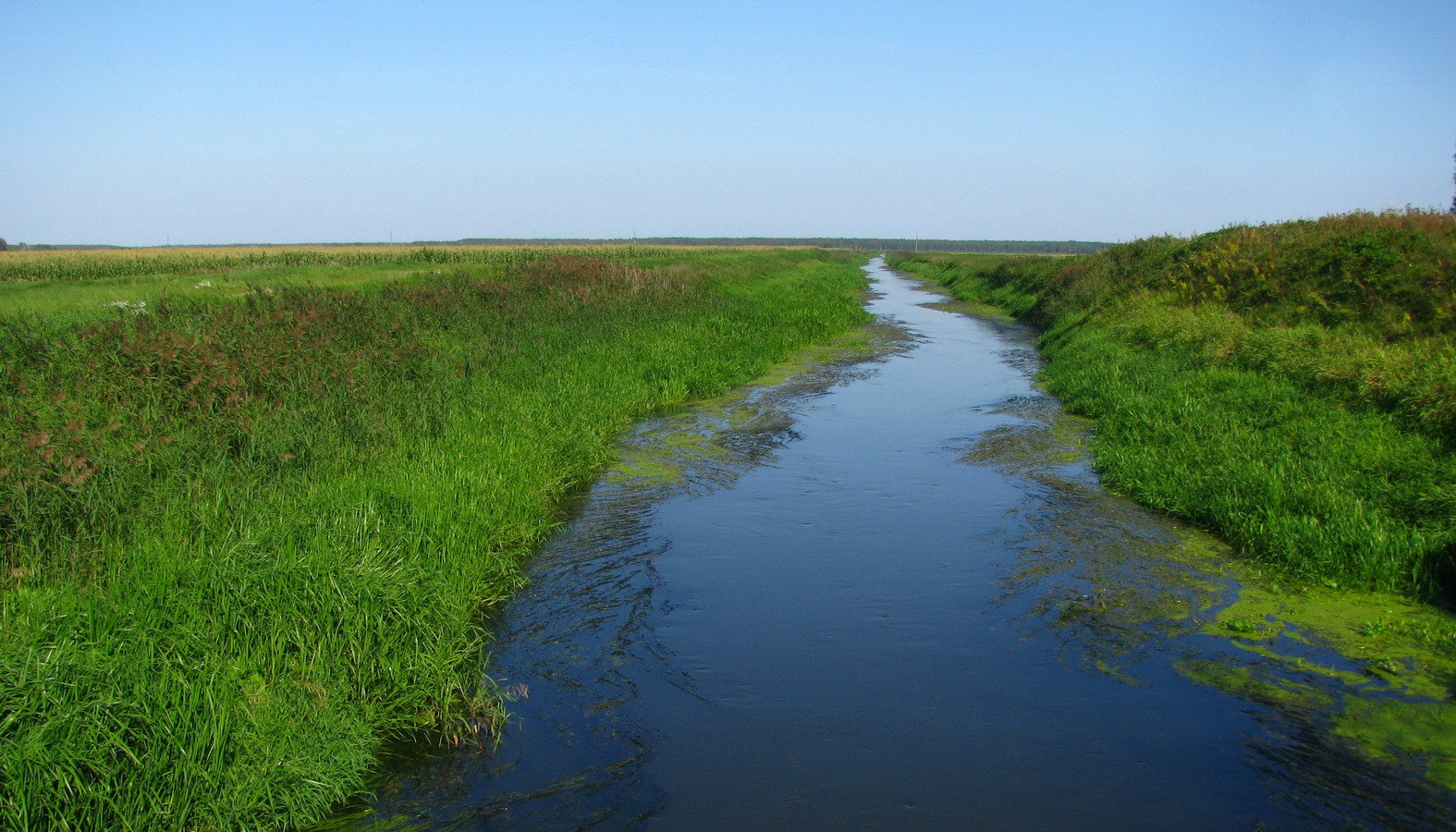 Река Уша. (Usha river)